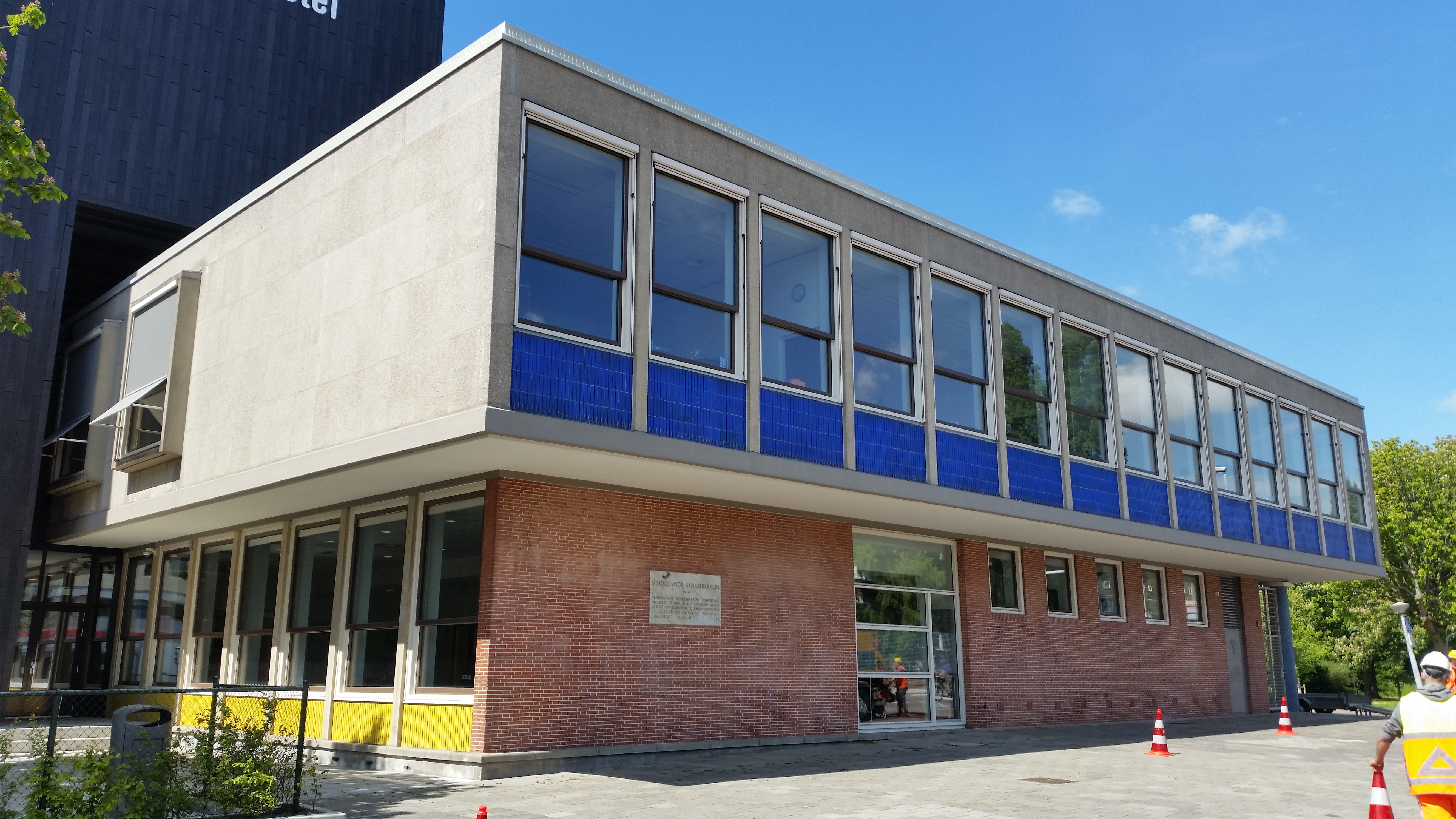 Impressie van Wibautstraat 220-222 te Amsterdam, mei 2020